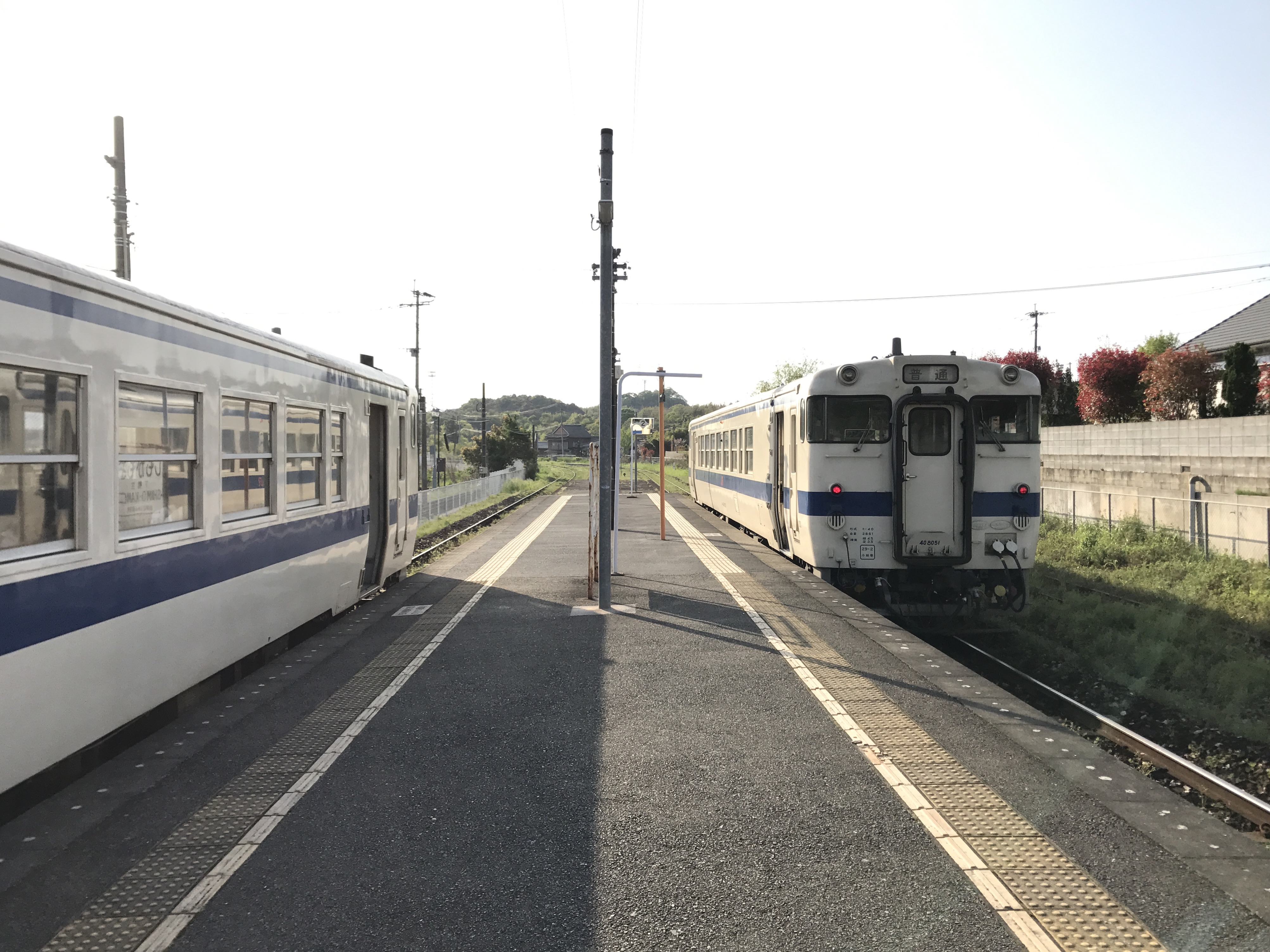 下鴨生駅のホーム(奥は上三緒方面)